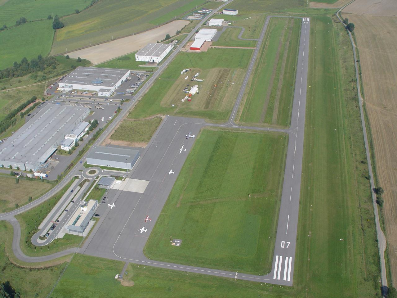 Luftaufnahme Chemnitz/Jahnsdorf